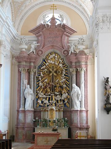 Hochaltar der Wallfahrtskirche Heiligenkreuz